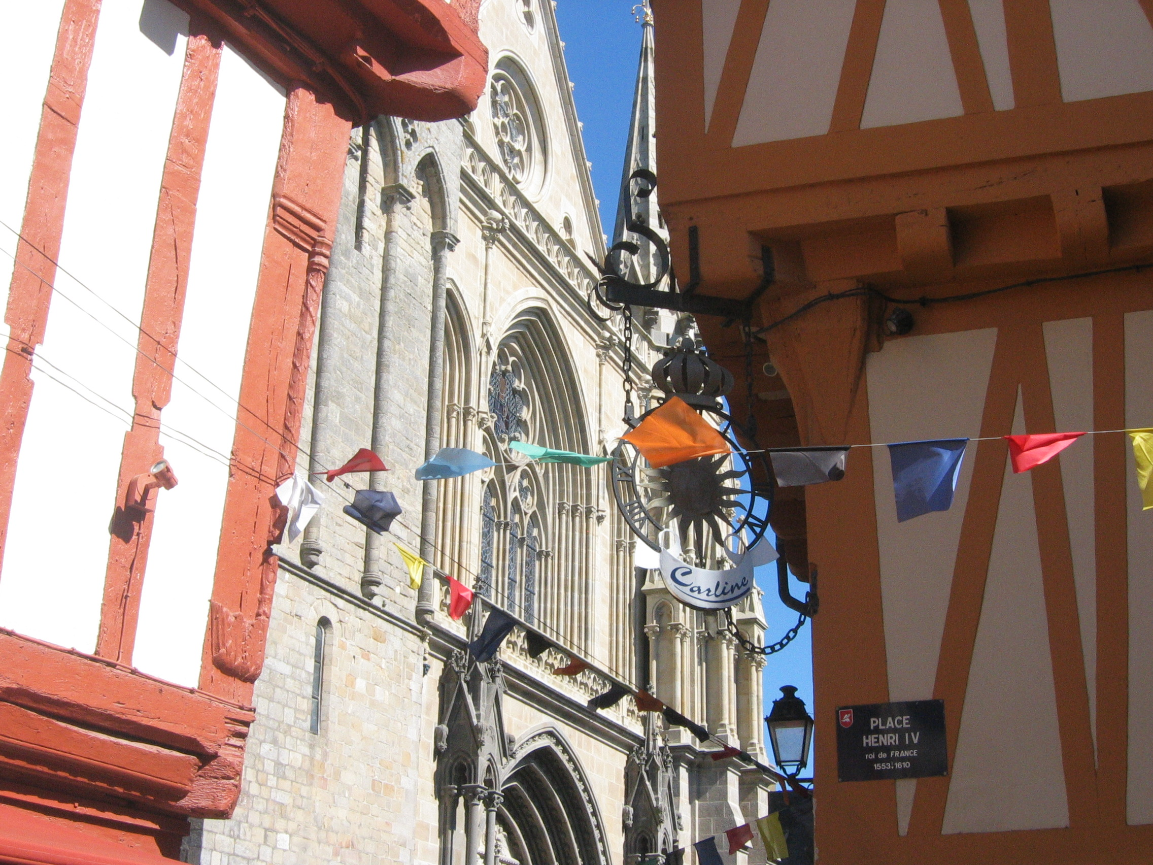 Maisons à pans de bois, vue sur la cathédrale pendant les fêtes historiques